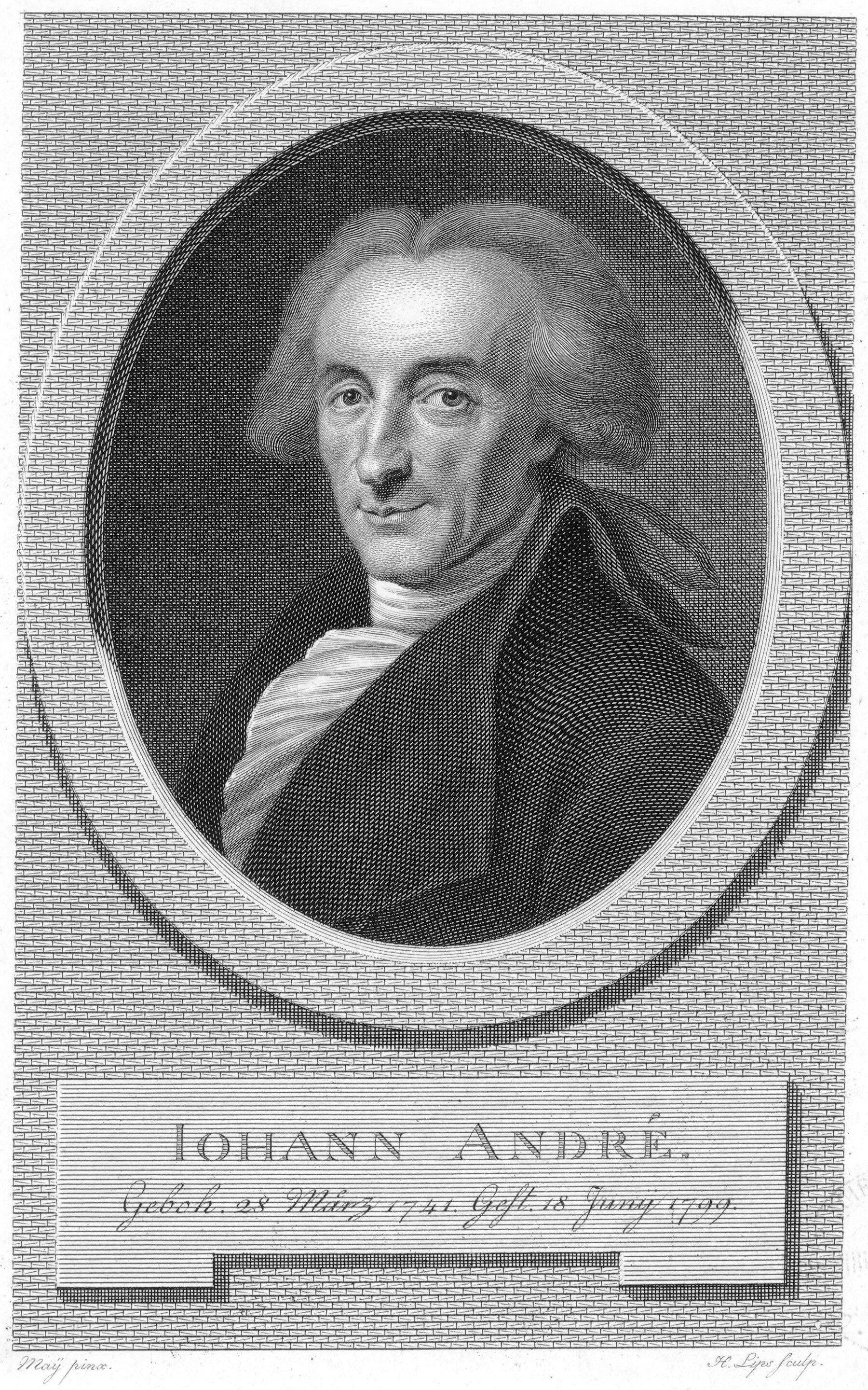 Johann André (1741–799) Komponist, Musikverleger zu Offenbach am Main. Seine erste selbstverfasste Operette "Der Töpfer" (1773) regte Goethe zu der Dichtung seines Singspiels "Erwin und Elmire" an; die Vertonung übertrug er André. Das Werk errang zunächst in Frankfurt, später in Berlin, wo André von 177-1784 als Kapellmeister am Döbbelinschen Theater wirkte, einen außergewöhnlichen Erfolg. Goethe besuchte den Komponisten am 17. Mai 1778 bei seinem einzigen Aufenthalt in der preußischen Residenz; diese persönliche Begegnung bedeutete zugleich den Abschluss der Beziehungen zu André.